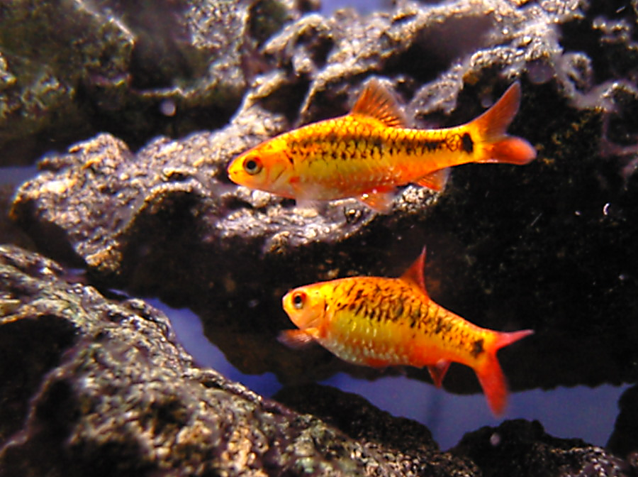 Gold Barb (Puntius semifasciolatus)